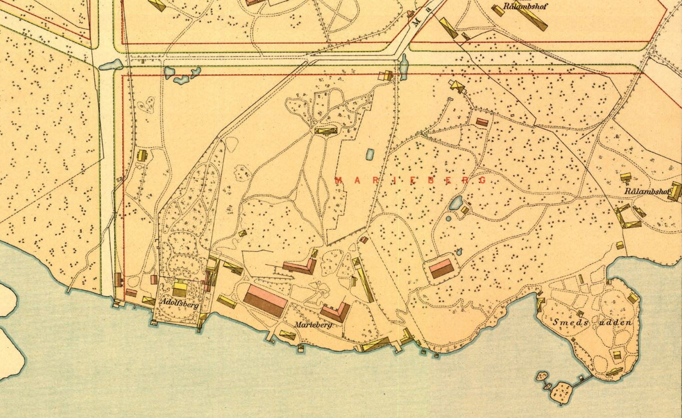 Del av Alfred Rudolf Lundgrens Stockholmskarta visande bl. a. Adolfsberg, Marieberg, Smedsudden